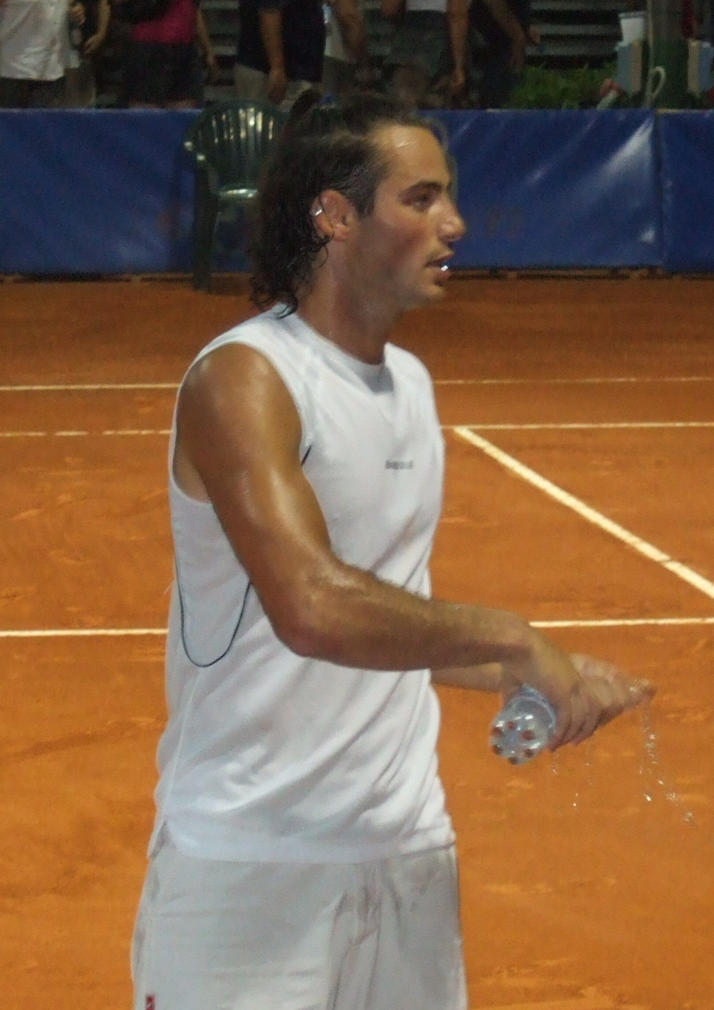 Federico Luzzi al Riviera di Rimini Challenger 2006, Quarti di finale, contro Simone Vagnozzi